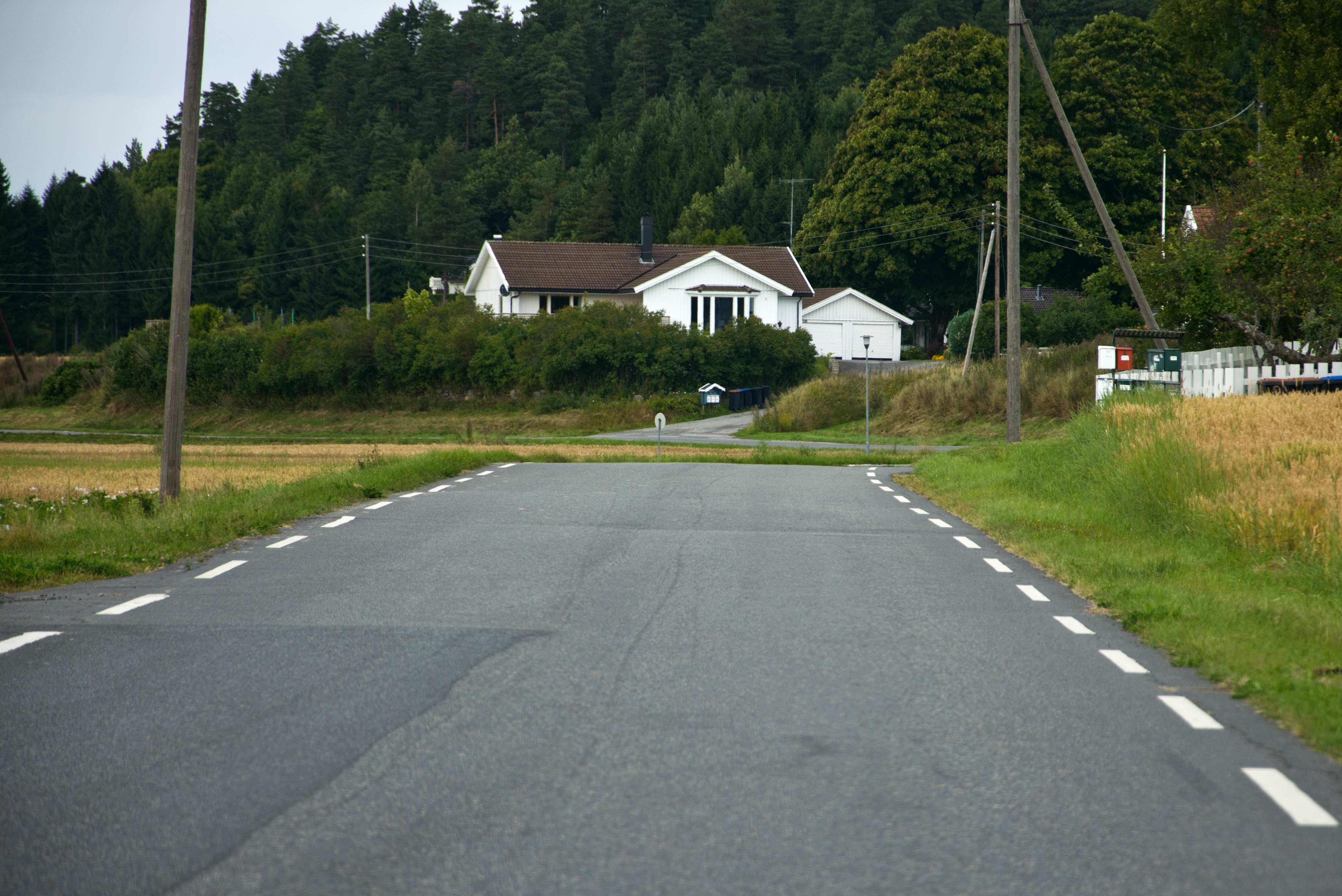 Fylkesvei 205 Hedrumveien i Vestfold, Norge